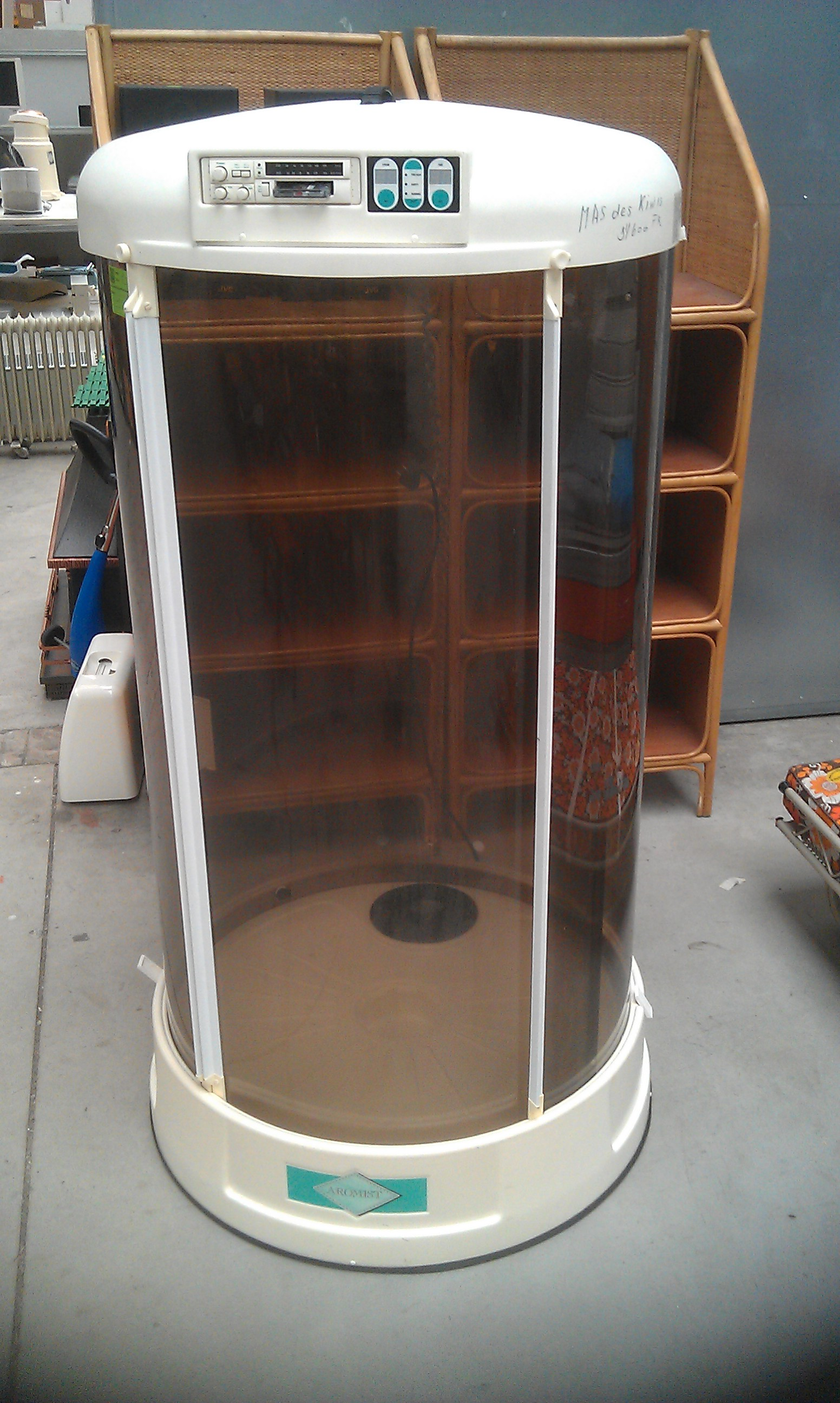 Een stoomcabine op Kringloopcentrum Amersfoort.